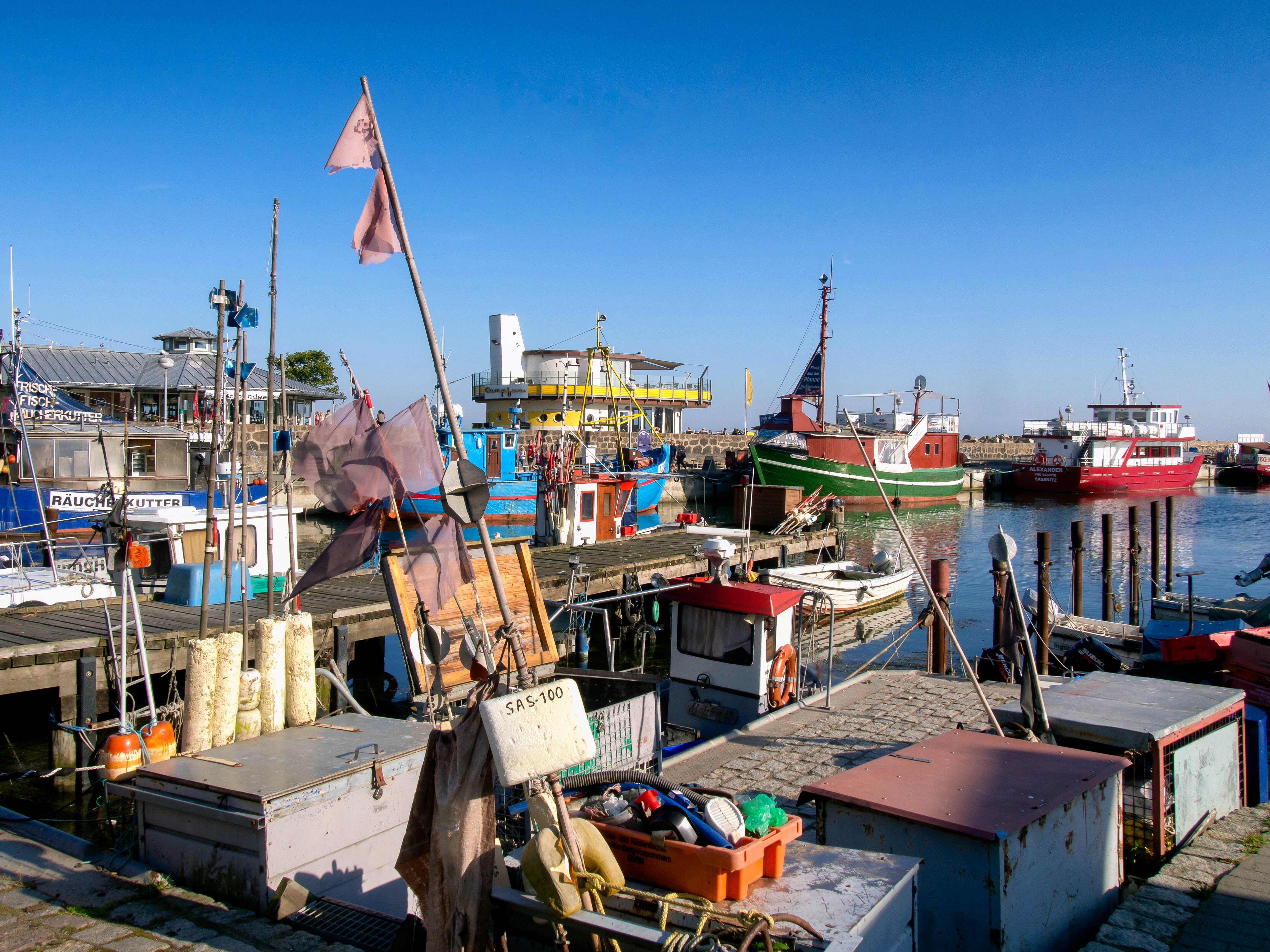 Fischkutter nach Feierabend im Alten Hafen von Sassnitz